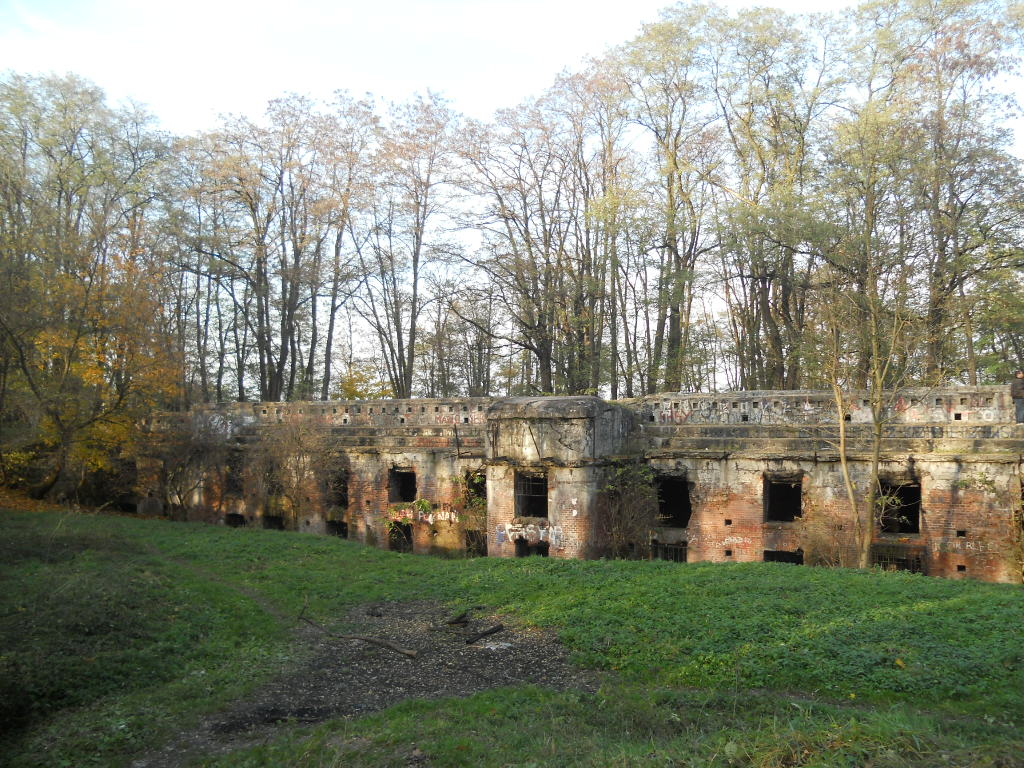 Fort pancerny pomocmiczy 48a "Mistrzejowice" w Krakowie na os. Piastów.